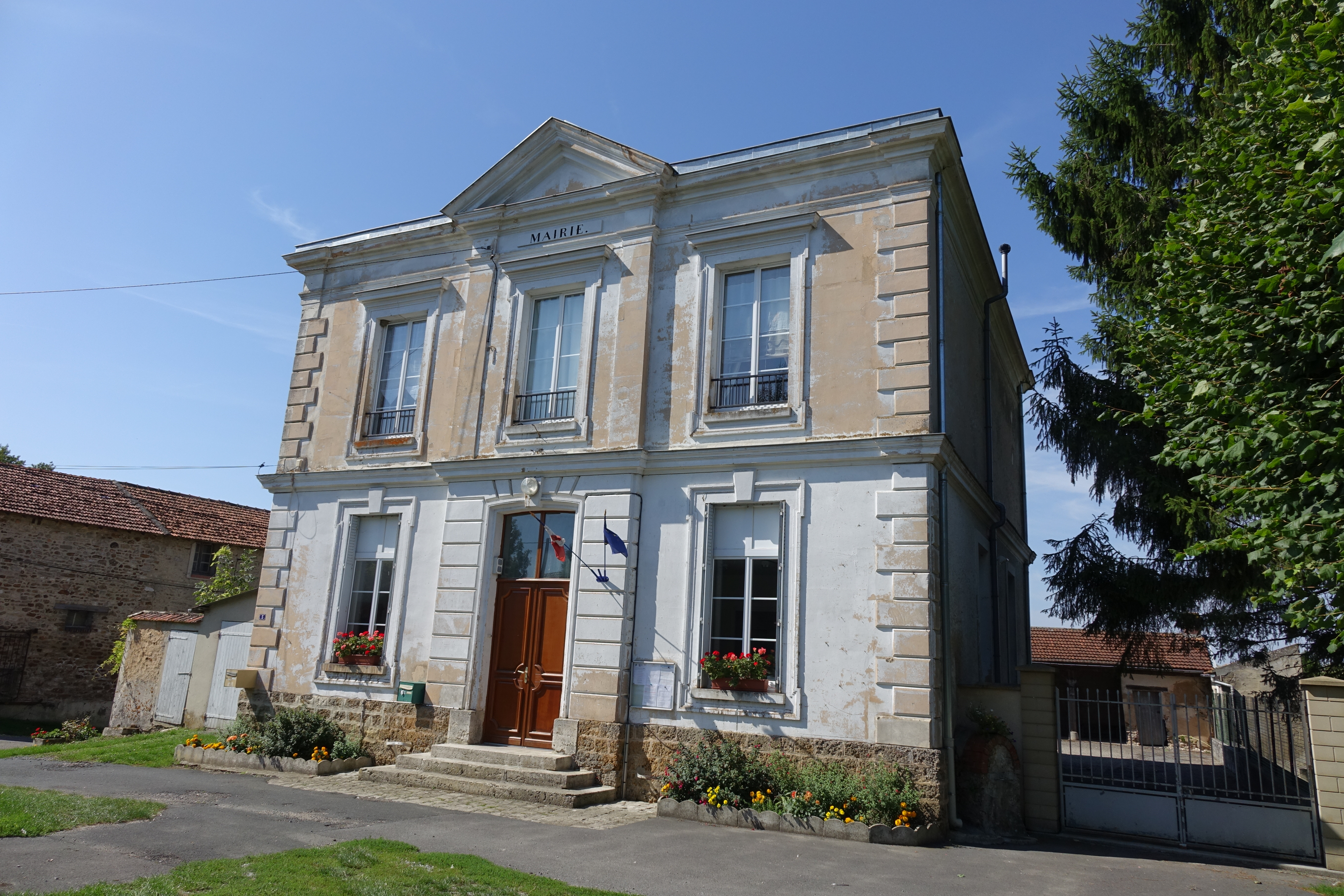 Mairie de Cierges, Aisne, France